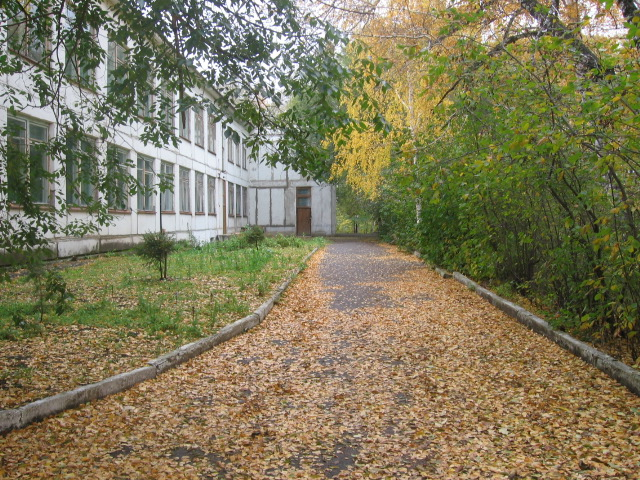 Вид Отрадниской школы сзади.